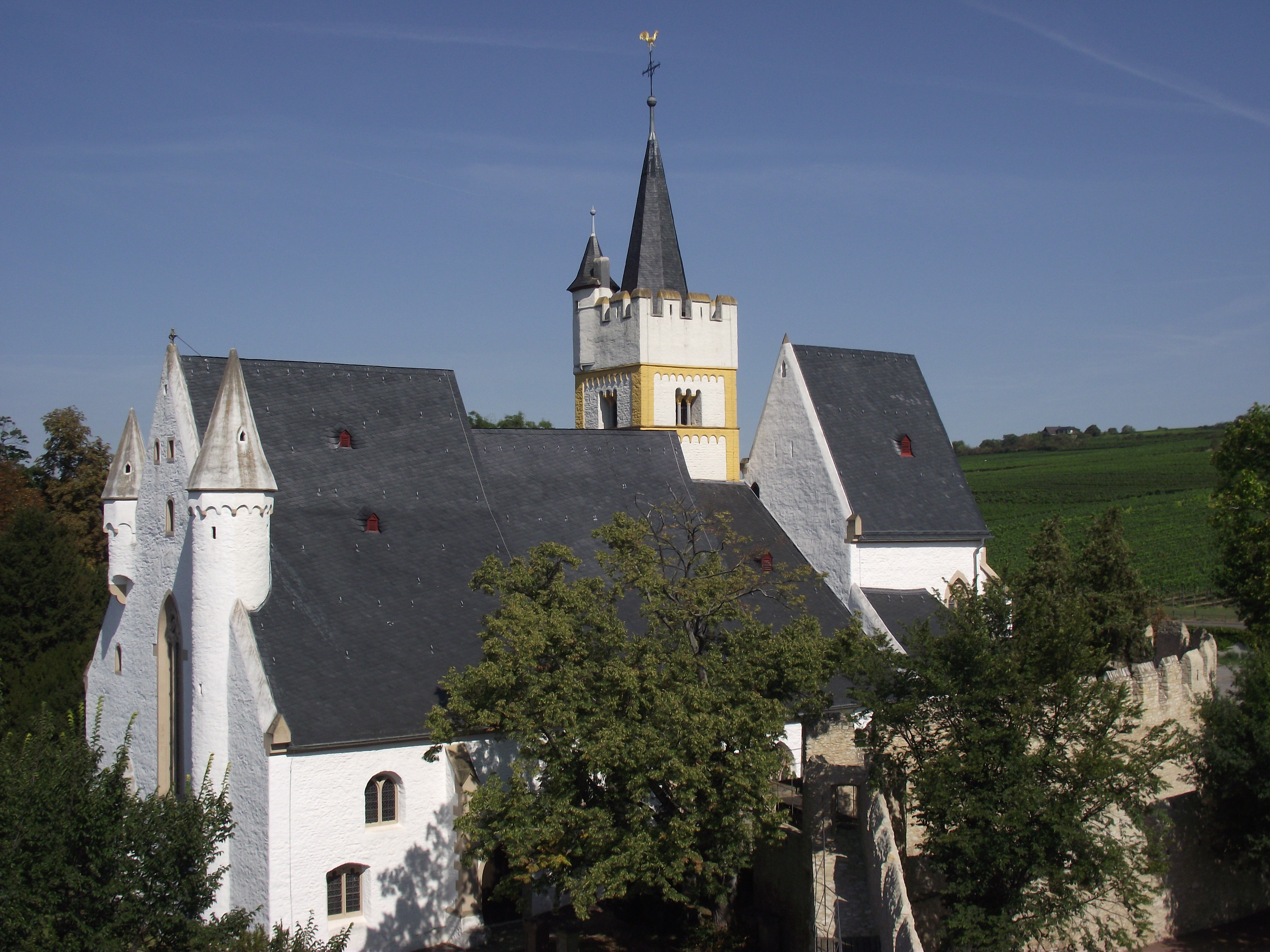 Burgkirche vom Malakoffturm aus im September 2010